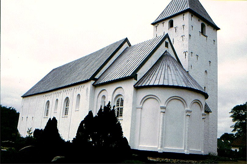 Vilslev Kirke i Danmark. Vilslev kirke